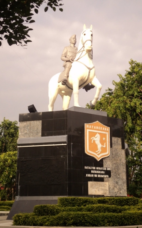 == Ringkasan == Description Monumen Mayangkara berada di Taman Mayangkara, depan Rumah Sakit Islam (RSI) Wonokromo-Surabaya. Tepatnya disamping jembatan Fly Over Wonokromo, Surabaya. Tujuan Monumen Kepahlawanan Mayangkara untuk mengenang jasa-jasa Batalyon Djarot seperti tertulis Di plakat monumen. Monumen ini diresmikan pada tanggal 4 April 1985 oleh Panglima Komando Daerah Militer VIII/Brawijaya Mayor Jenderal TNI Soelarso. PD-IDGOV Jenis lisensi This file is in the public domain in Indonesia, because it is published and distributed by the Government of Republic of Indonesia, according to Article 43 of Law 28 of 2014 on copyrights. There shall be no infringement of Copyright for: Publication, Distribution, Communication, and/or Reproduction of State emblems and national anthem in accordance with their original nature; Any Publication, Distribution, Communication, and/or Reproduction executed by or on behalf of the government, unless stated to be protected by laws and regulations, a statement to such Works, or when Publication, Distribution, Communication, and/or Reproduction to such Works are made; Reproduction, Publication, and/or Distribution of Portraits of the President, Vice President, former Presidents, former Vice Presidents, National Heroes, heads of State institutions, heads of ministries/nonministerial government agencies, and/or the heads of regions by taking into account the dignity and appropriateness in accordance with the provisions of laws and regulations Monumen Mayangkara berada di Taman Mayangkara, depan Rumah Sakit Islam (RSI) Wonokromo-Surabaya. Tepatnya disamping jembatan Fly Over Wonokromo, Surabaya. Tujuan Monumen Kepahlawanan Mayangkara untuk mengenang jasa-jasa Batalyon Djarot seperti tertulis Di plakat monumen. Monumen ini diresmikan pada tanggal 4 April 1985 oleh Panglima Komando Daerah Militer VIII/Brawijaya Mayor Jenderal TNI Soelarso.